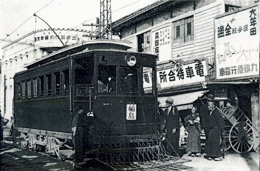 九州鉄道福島甘木線(現・西鉄甘木線・福島線)。久留米にて。大牟田迄今秋全通 九鐵急行電車」の看板があるが、全通は1939年7月1日なので予定が遅れた？杵屋栄二氏の撮影した写真は1938年以前の物しか残っていないはず。 左に北野銀行久留米支店が見える。